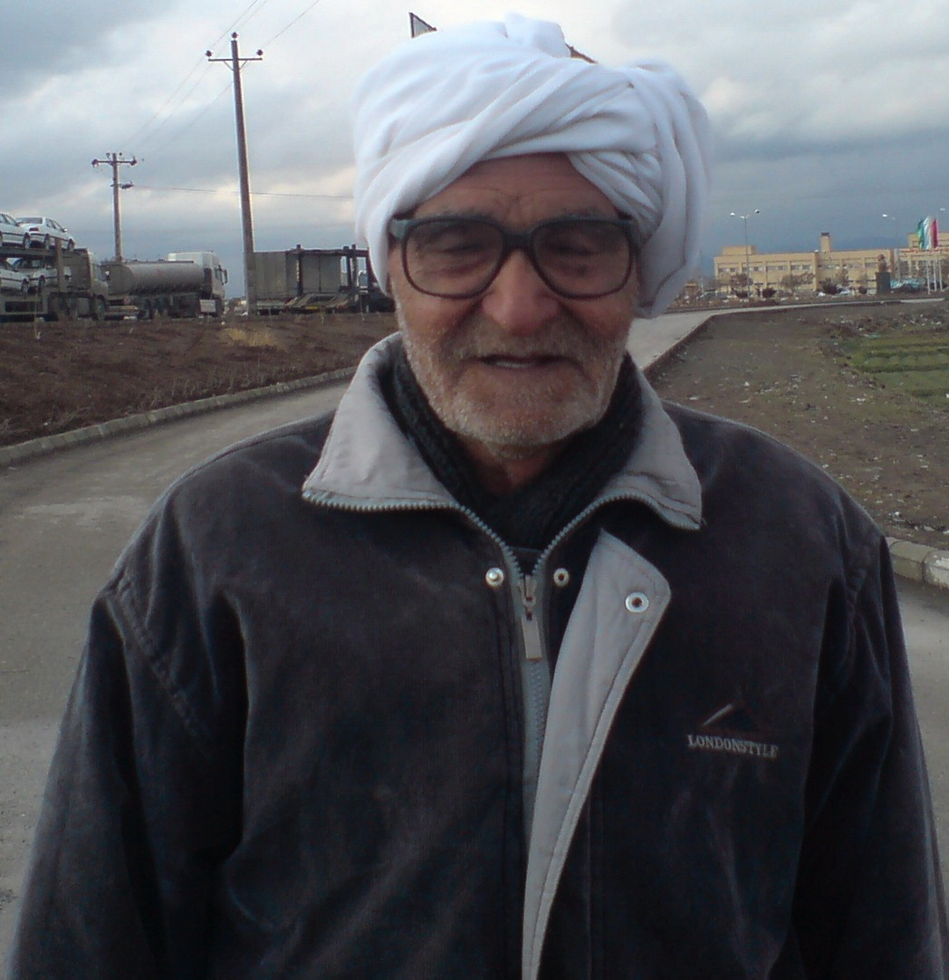 Nishapuri_Oldman